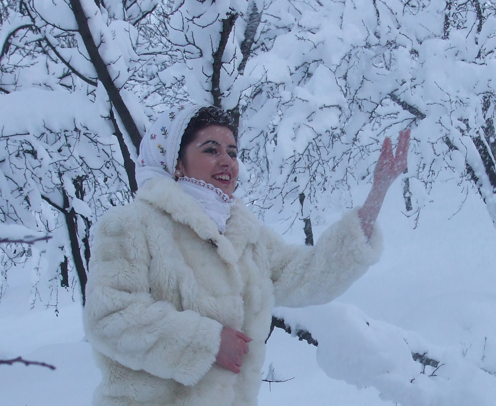 Izabela Tomita